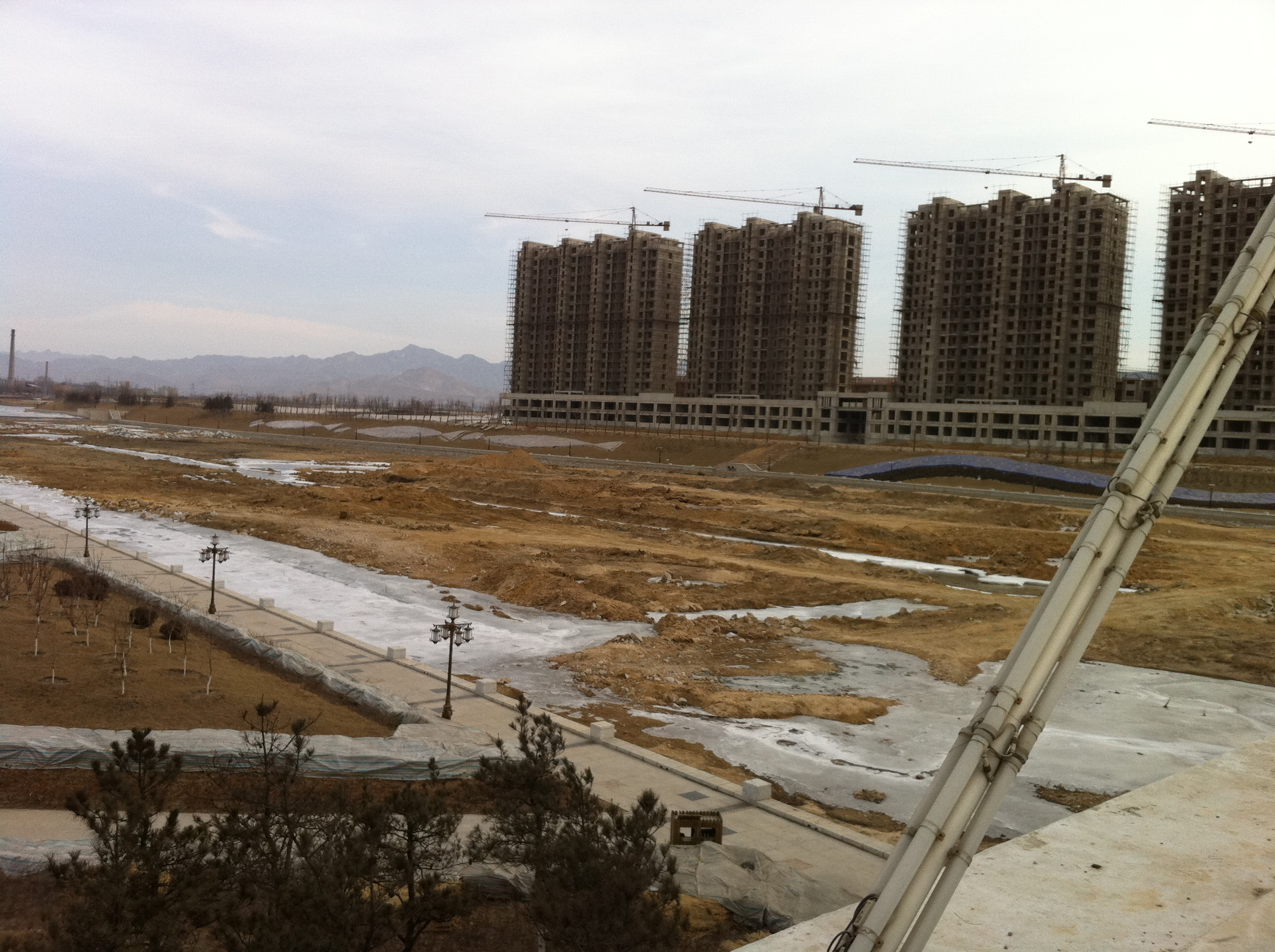 Bayuquan, Yingkou, Liaoning, China